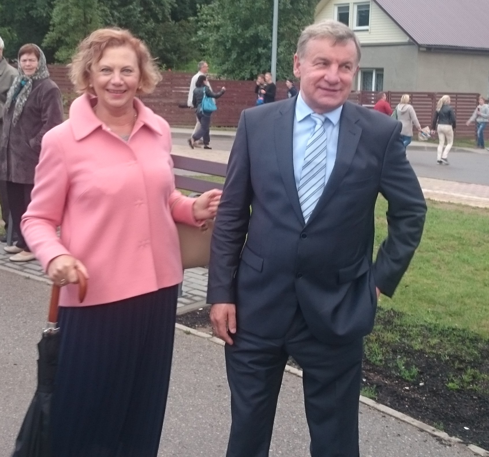 Rim. Sink.